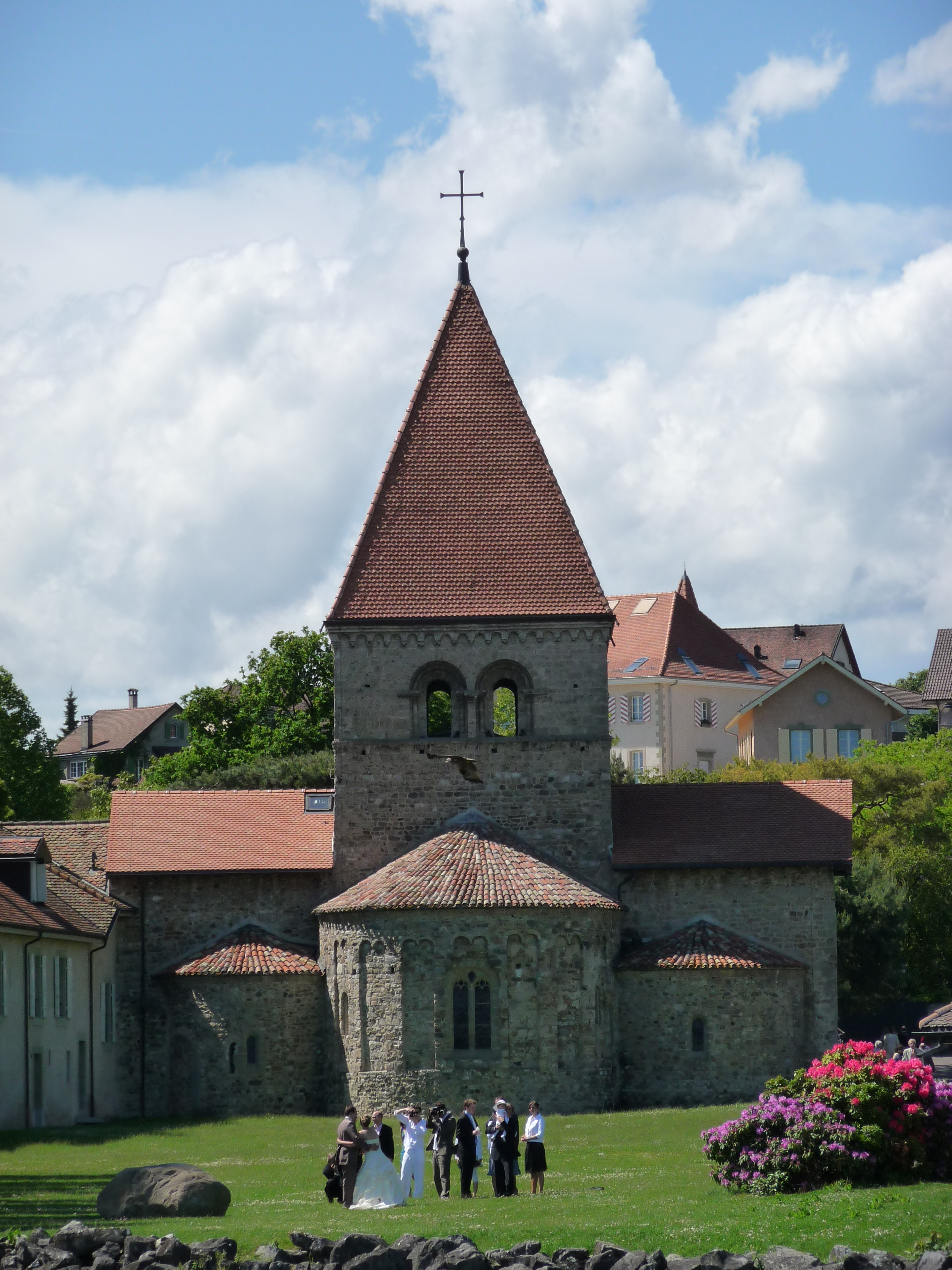 St-Sulpice